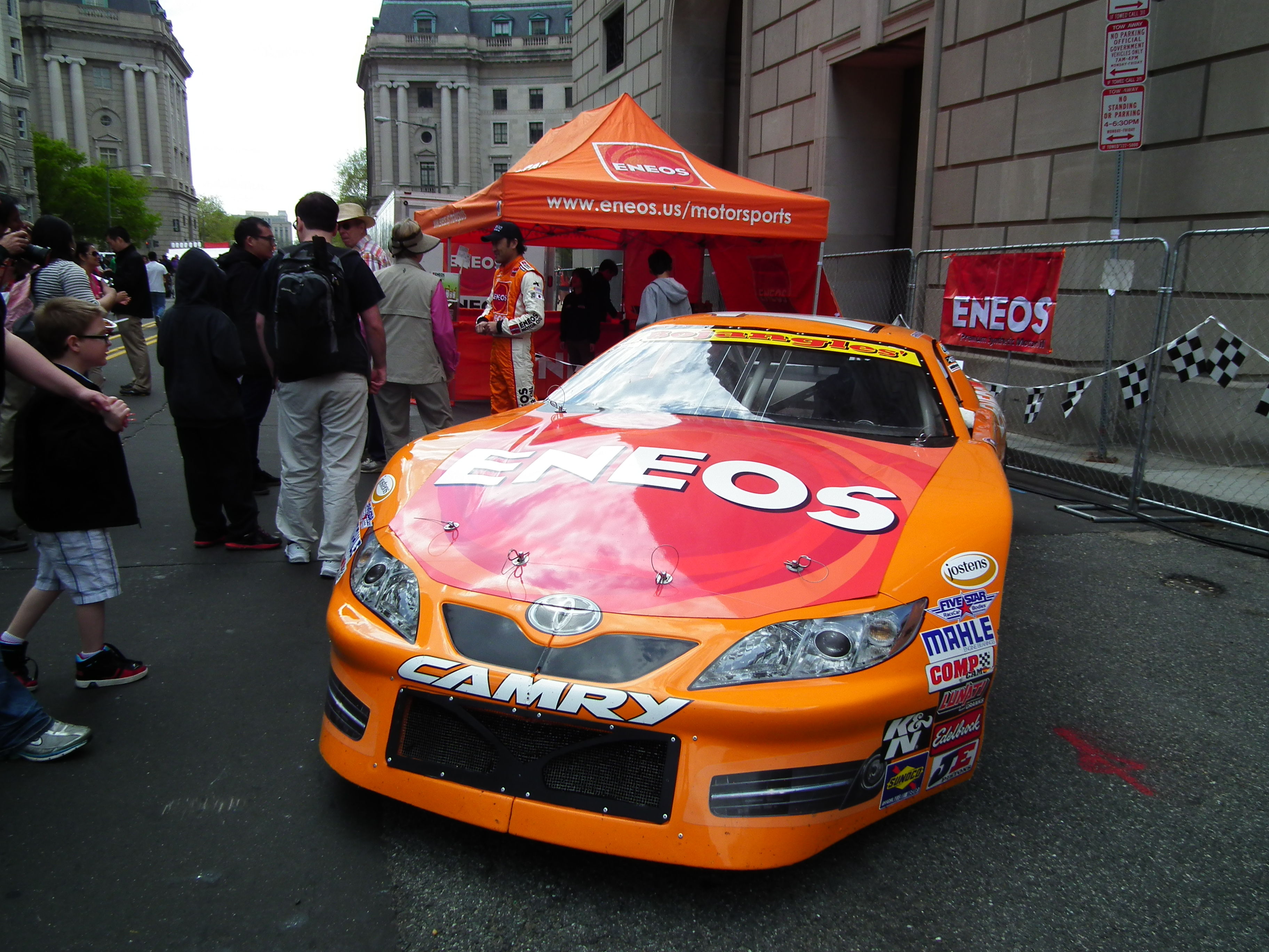 Sakura Masturi Japanese Festival DC 2013